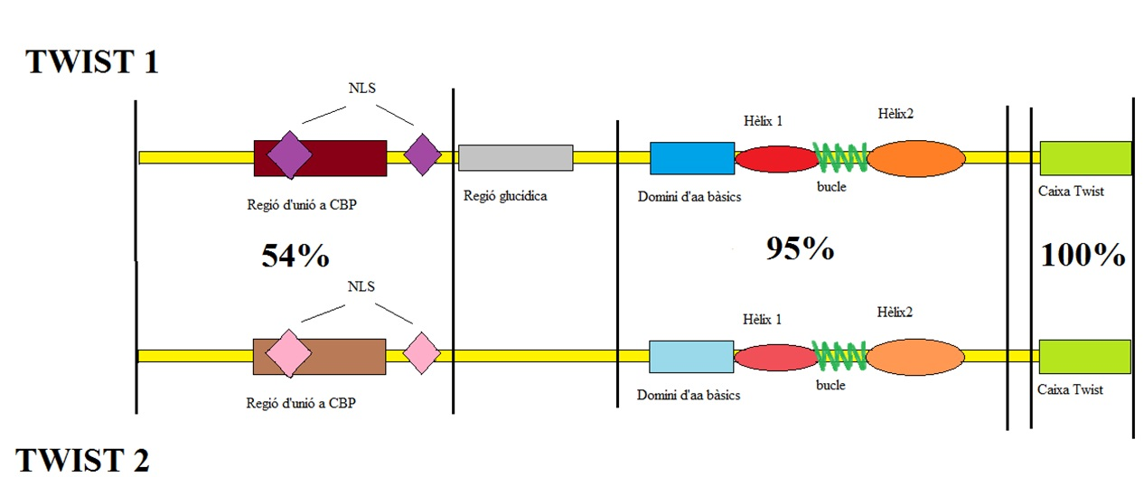 Comparativa estructural entre twist1 i twist2